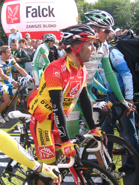 Czwarty etap 64. Tour de Pologne: Chojnice - Poznań